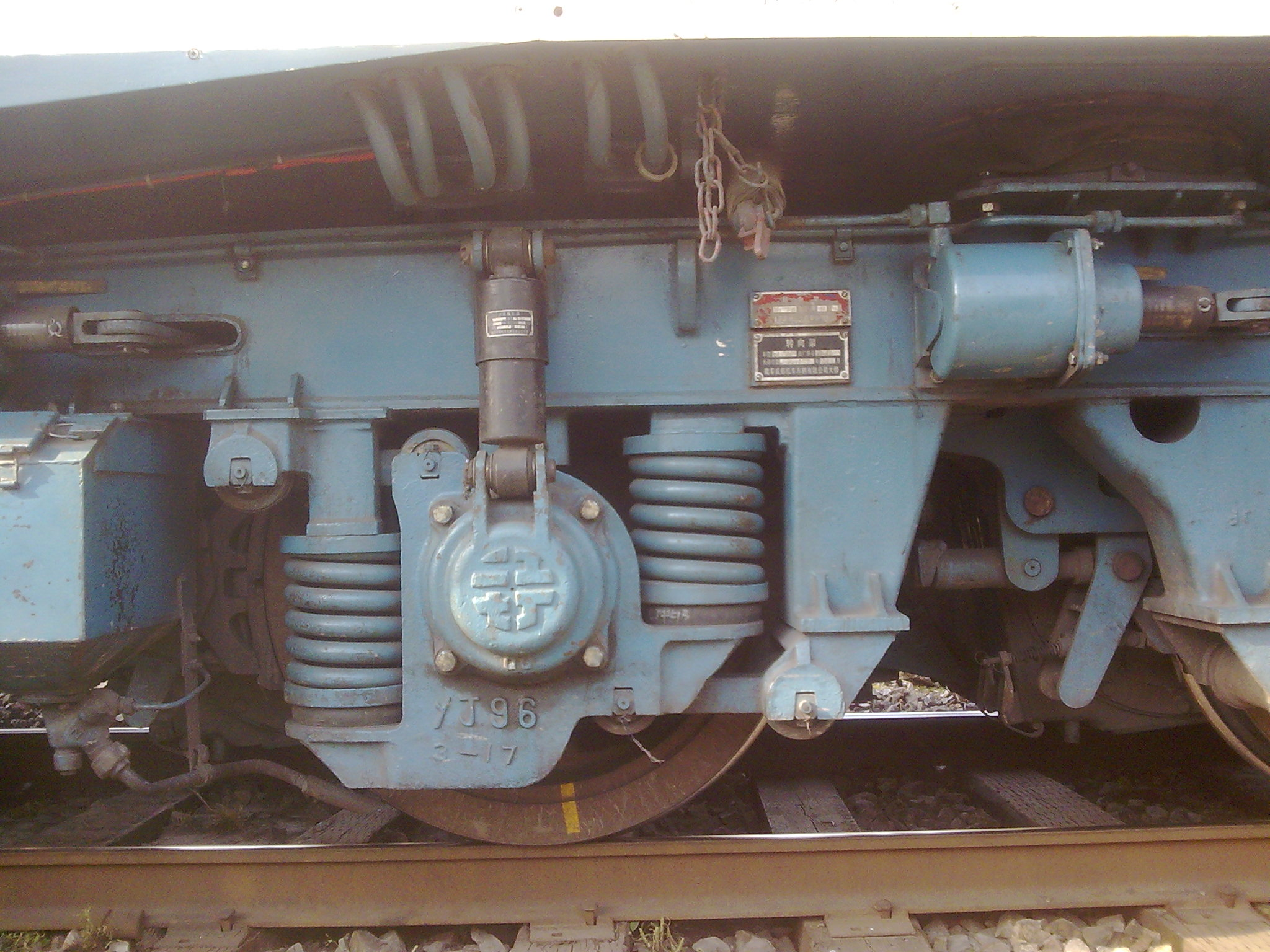 东风7C型柴油机车 5197号